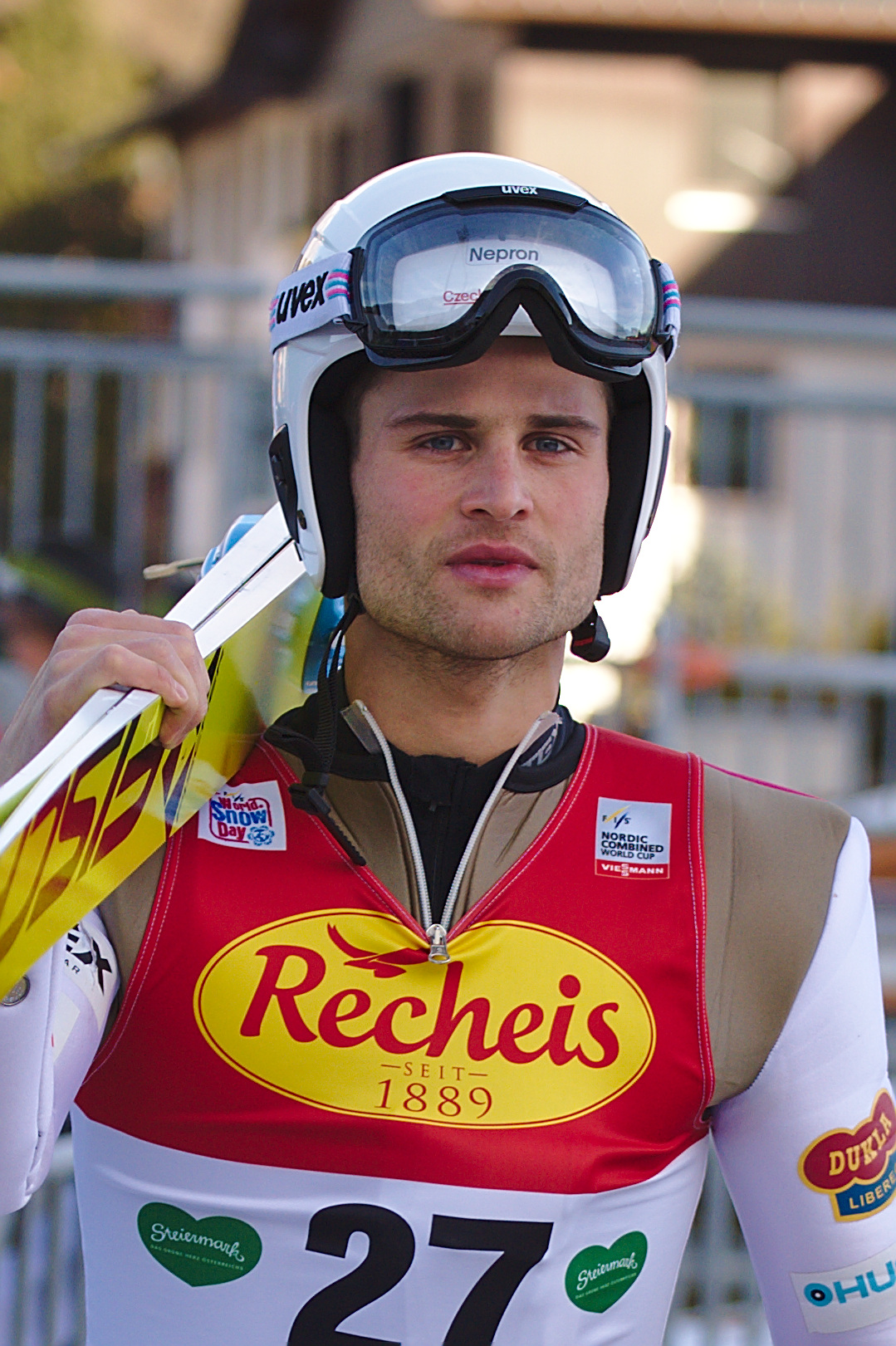 FIS Worldcup Nordic Combined Ramsau 2016. Bild zeigt Miroslav Dvorak (CZE)